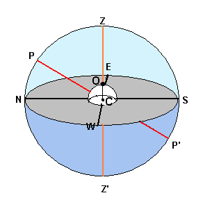 Diagrama que muestra el horizonte astronómico de un observador sobre la superficie de la Tierra, su vertical ZZ' y el eje del mundo. Dibujo original. Puede ser reproducido libremente.